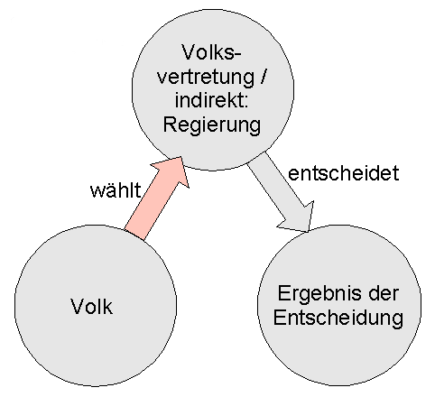 Schaubild Input-Legitimation Autor: C.Löser Erstellt mit: de: Draw